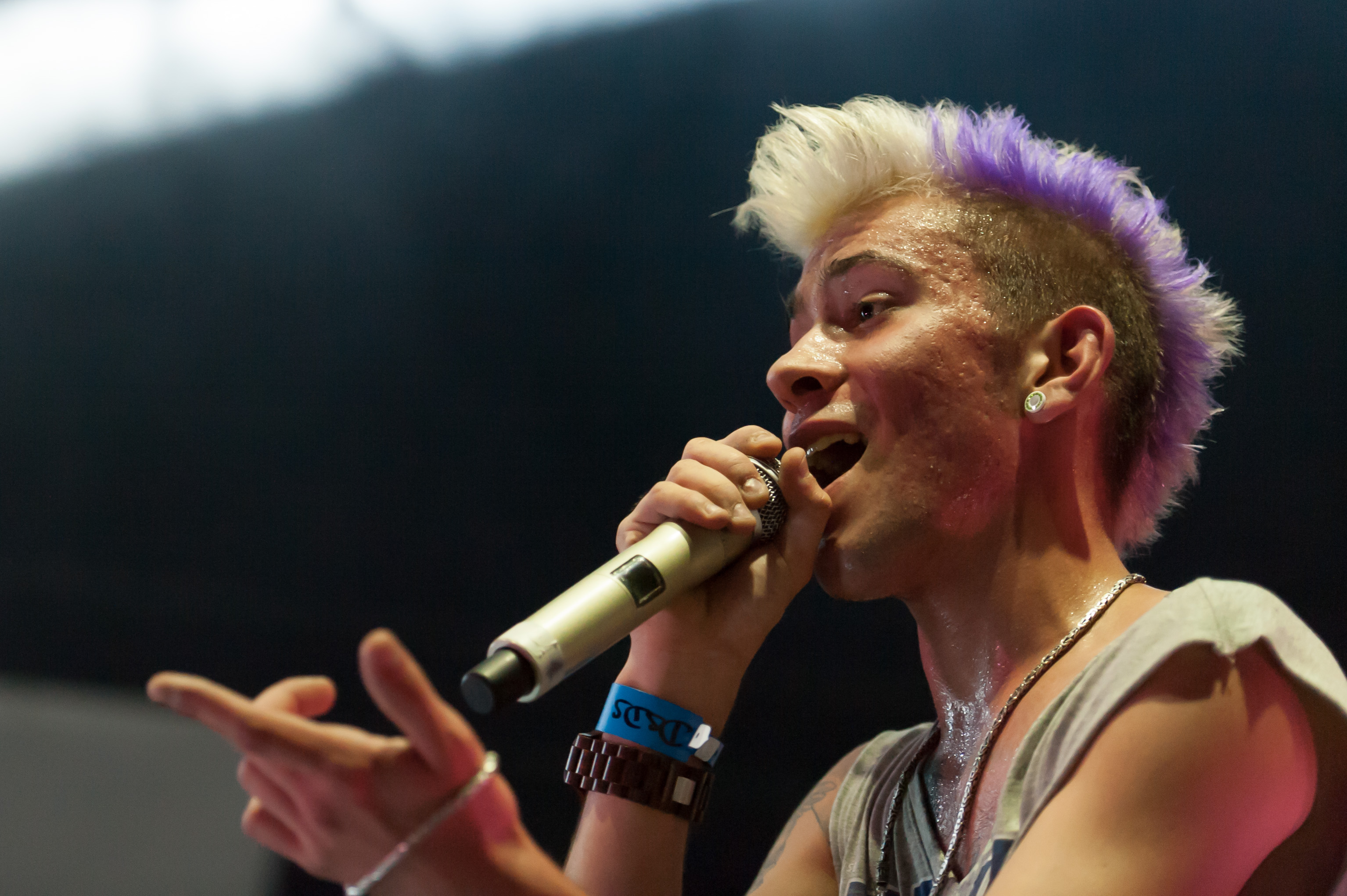 DSDS - Live on Tour 27. Juli 2014, Stadthalle Wien Daniele Negroni